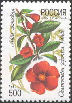 Почтовая марка России